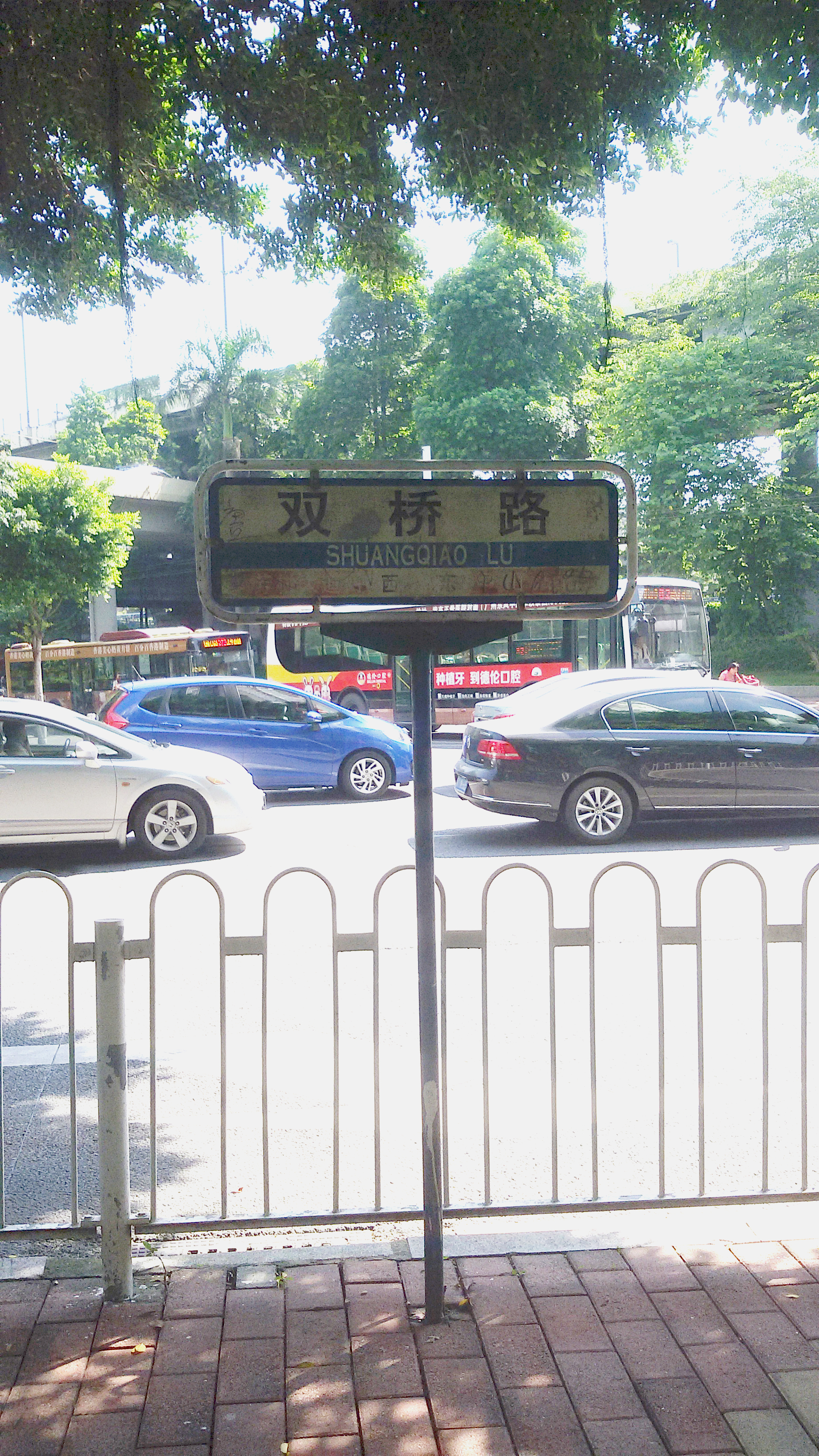 粵語: 雙橋路嘅路牌